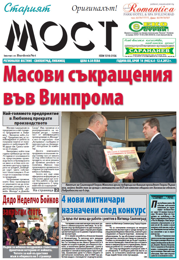 Първа страница на в-к "Старият мост"